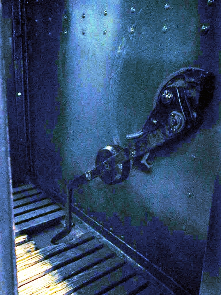 Heittovipujarru Fiskarsin muistomerkkiveturissa